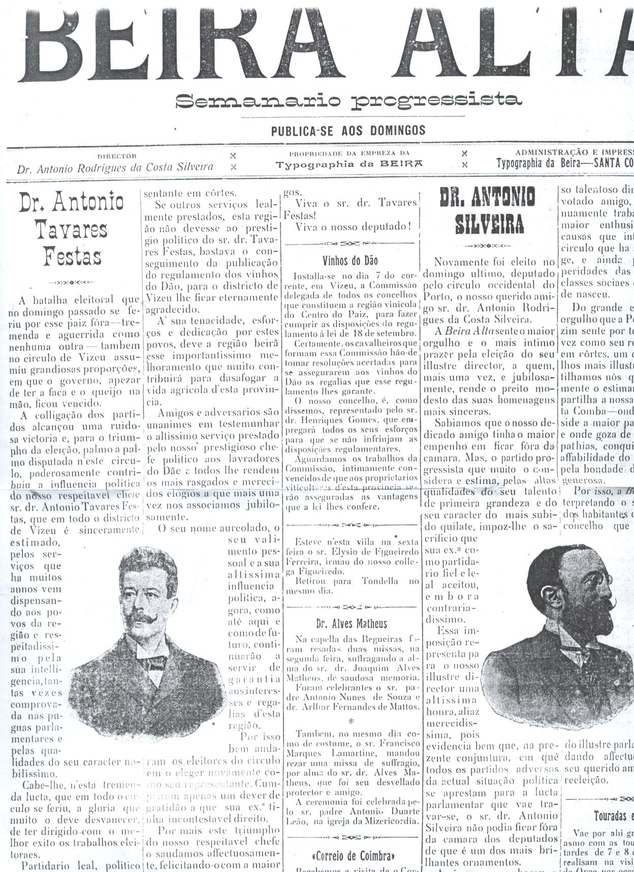 última reeleição de Tavares Festas em 1910 - frontispício do semanário Beira Alta para a ocasião. Tavares Festas' last reelection in 1910, front page of Beira Alta newspaper